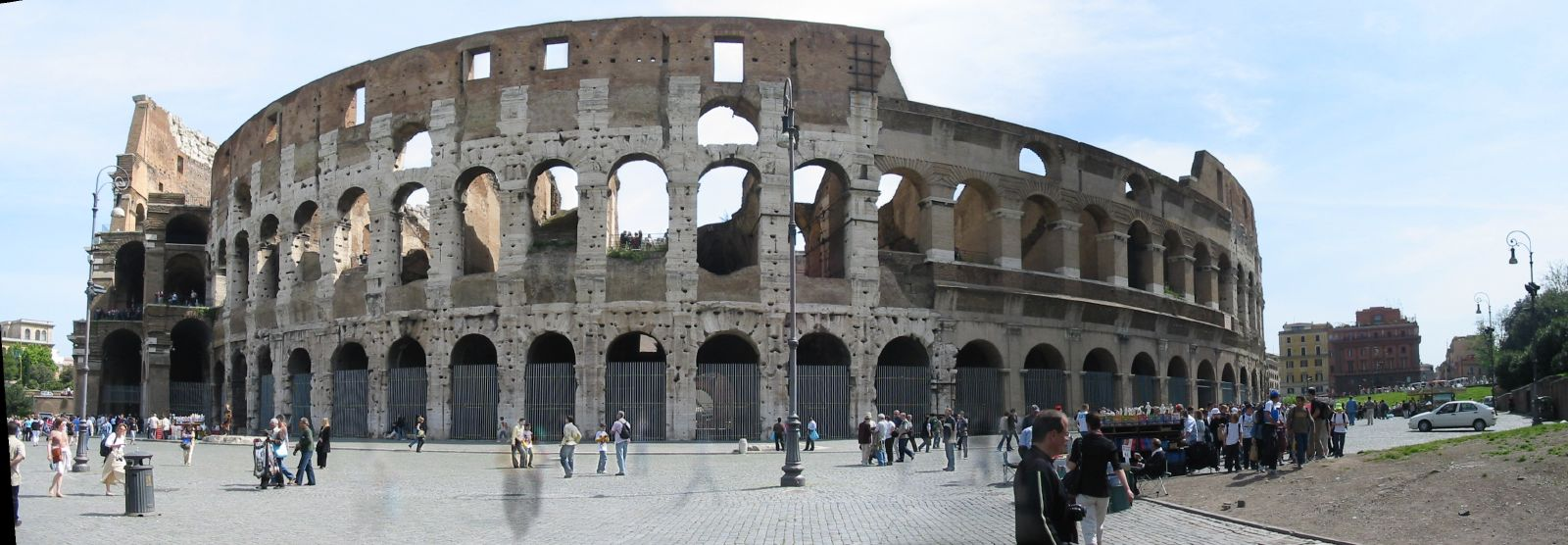 Colosseum, Rome. Panoramic view